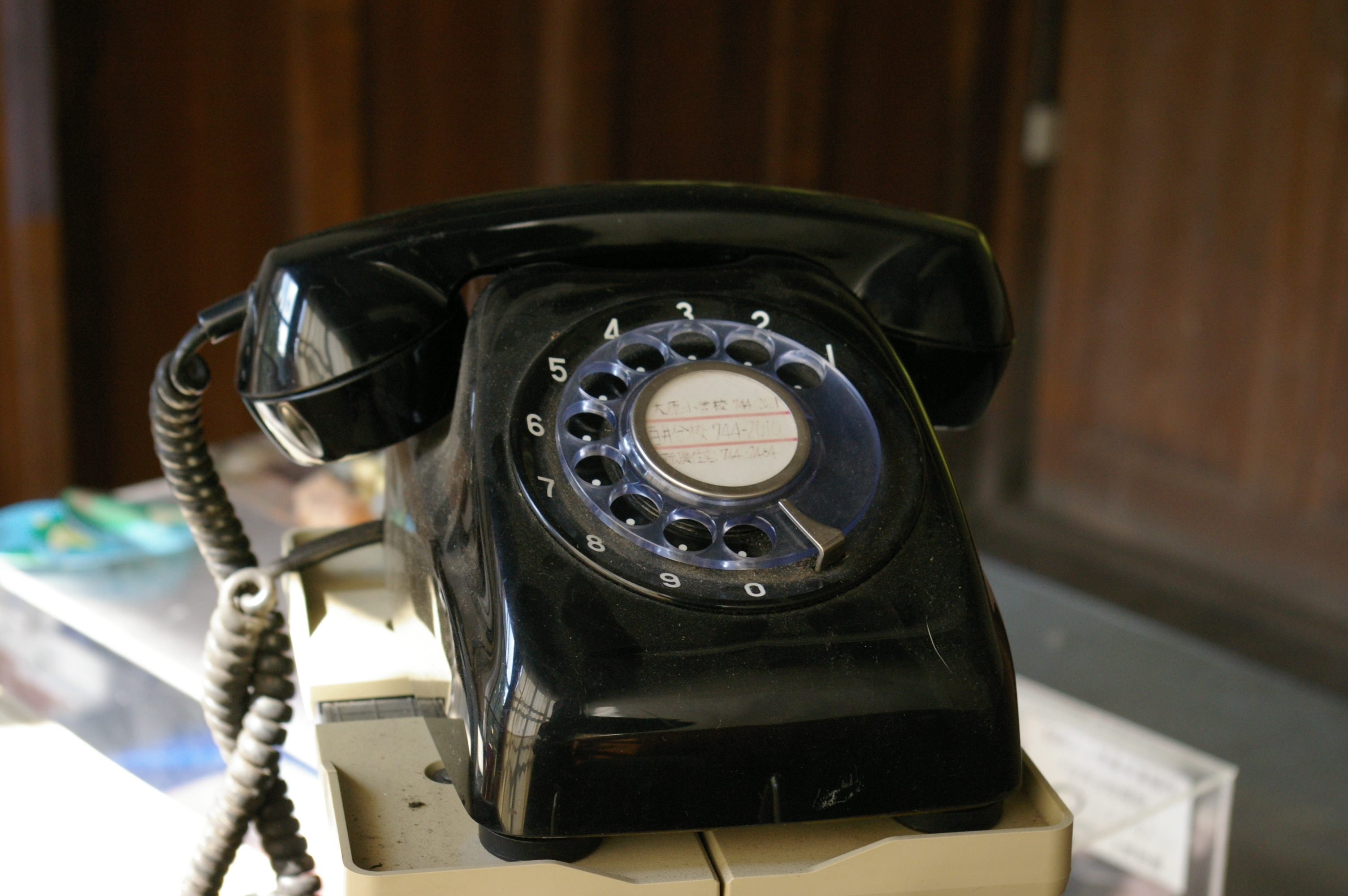 kurodenwa